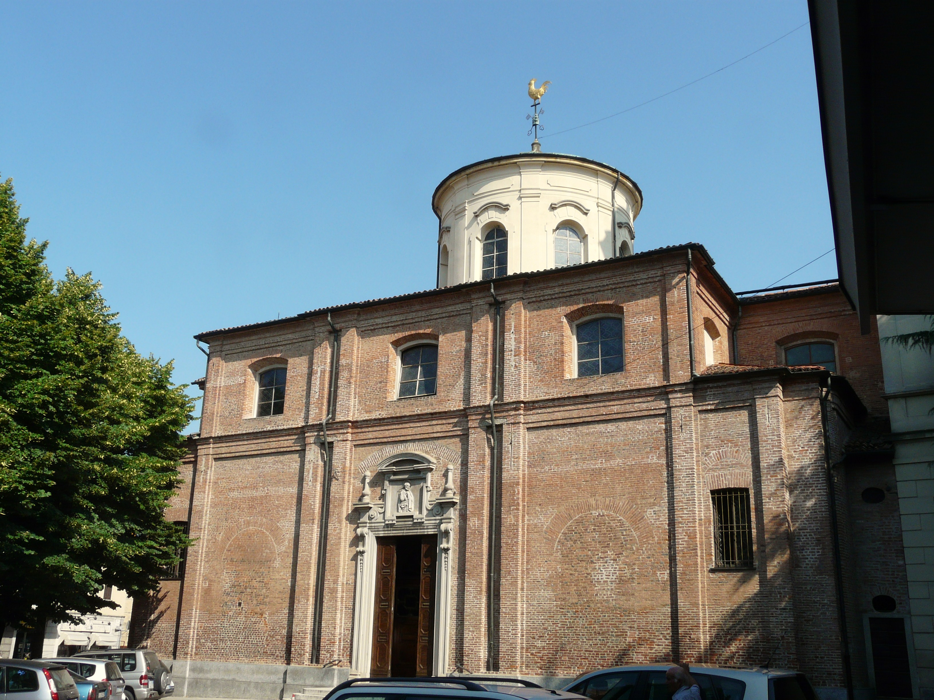 Chiesa di San Pietro, Abbiategrasso, Lombardia, Italia